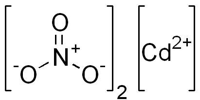 chemical structure of cadmium nitrate